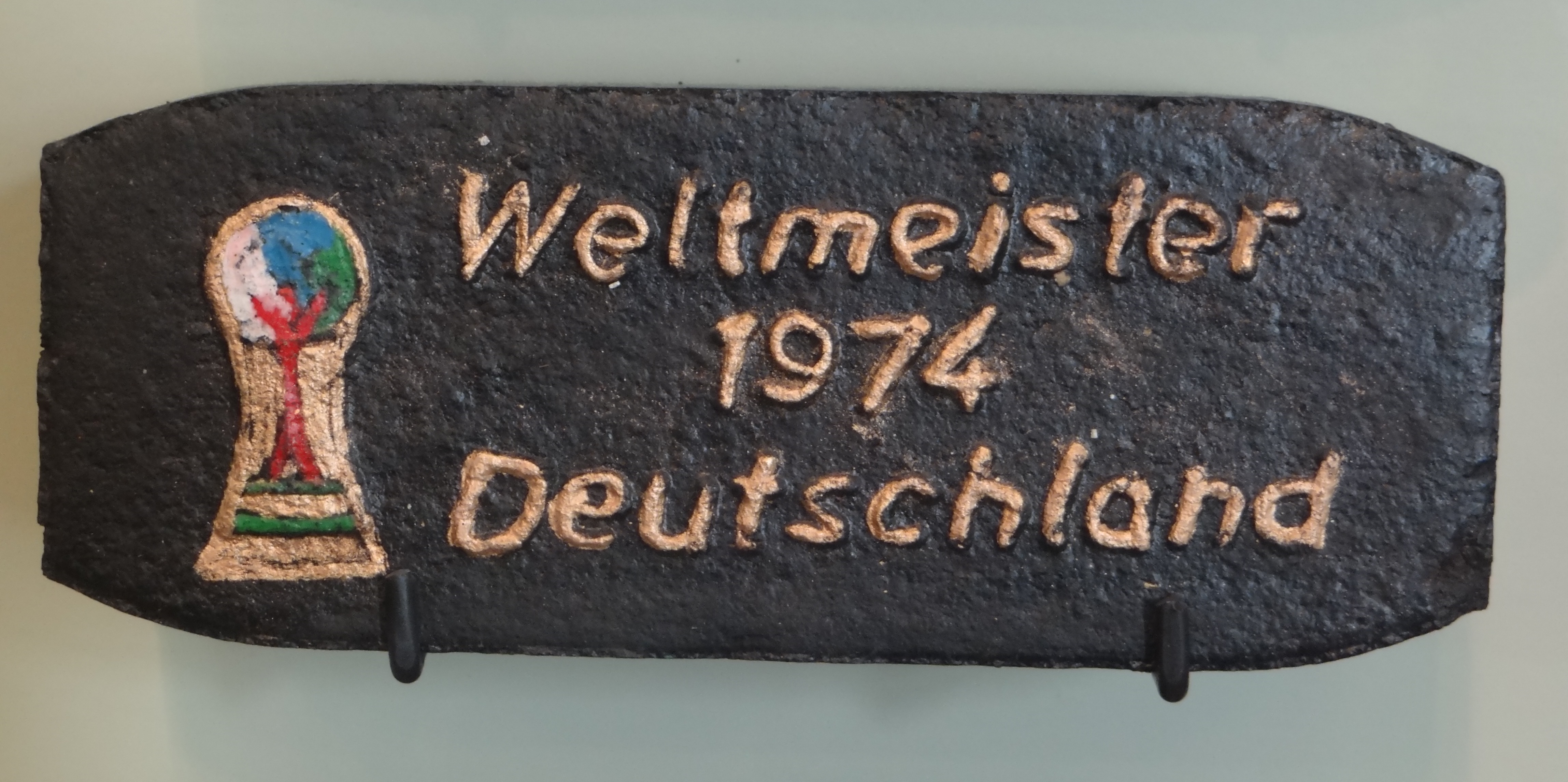 Deutsches Bergbau-Museum Bochum. Halle 19: Aufbereitung und Rohstoffveredlung. Kohlebrikettierung: Schmuckbriketts